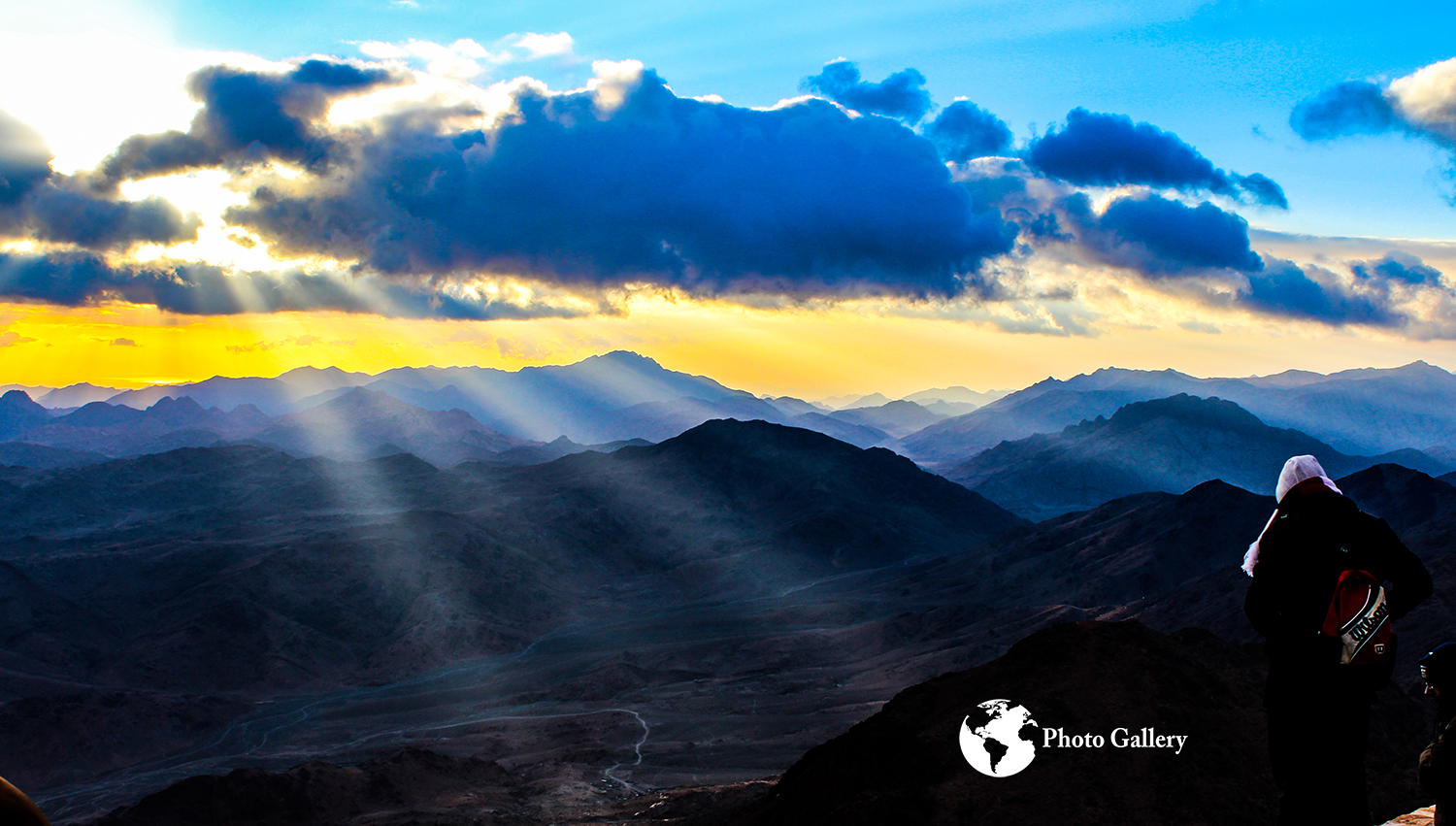 شروق الشمس فوق جبل سانت كاترين